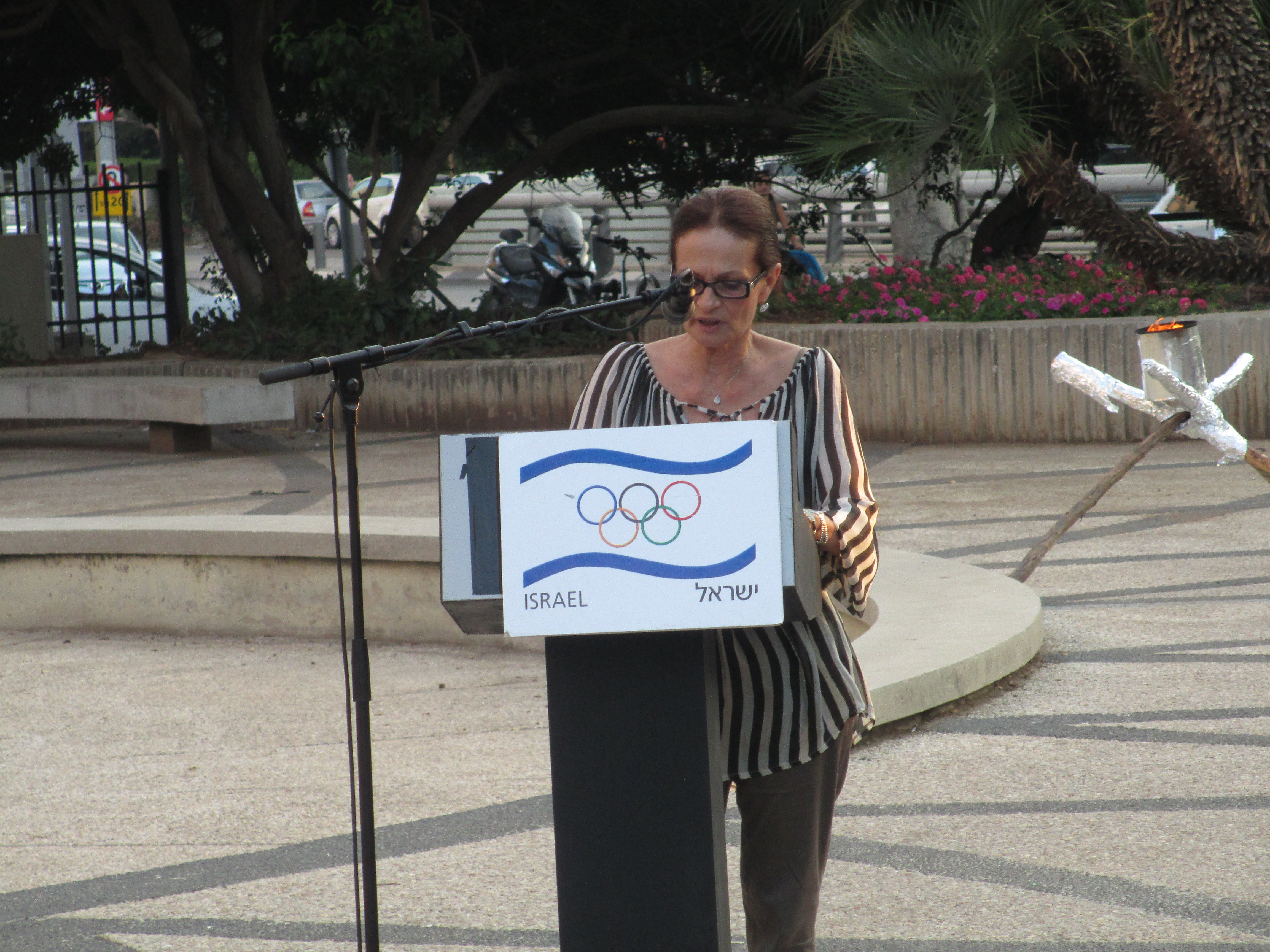 אילנה רומנו בטקס זיכרון לטבח הספורטאים באולימפיאדת מינכן, תל אביב, 29/8/13